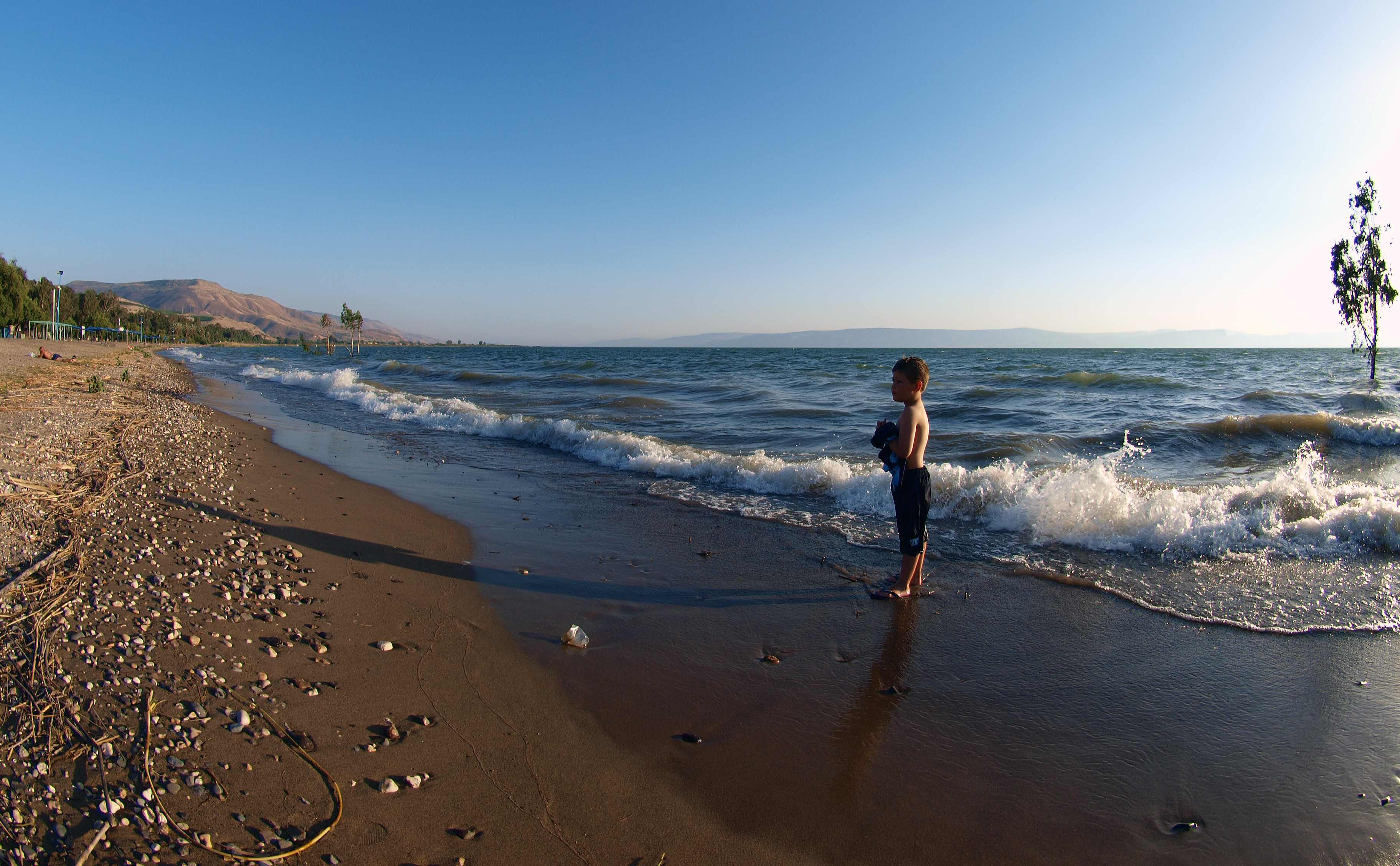 Озеро Кинерет (Галилейское море), Израиль.